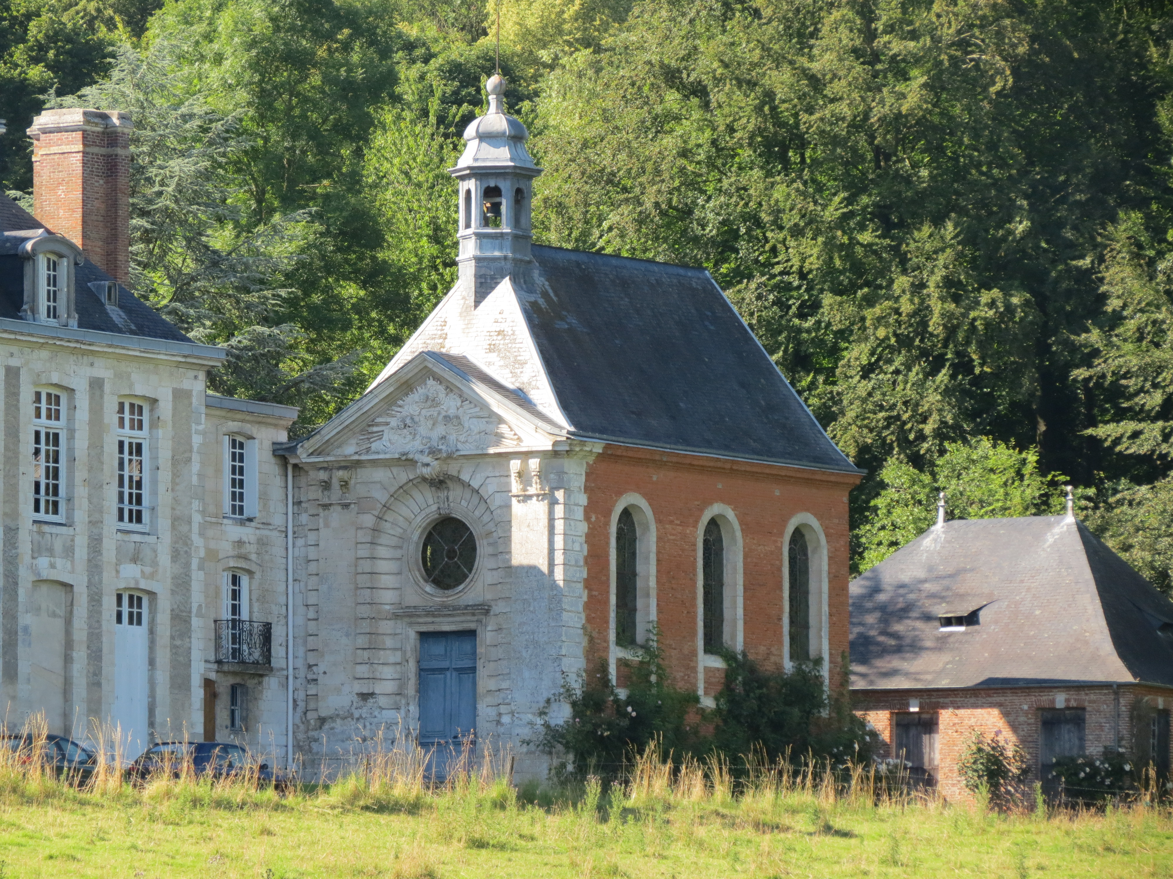 Château d'Esneval.